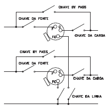 Diagrama RT delta aberto